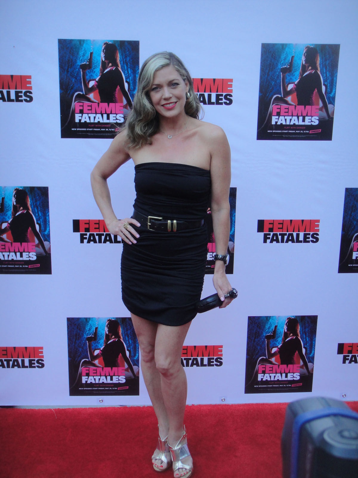 Femme Fatales Red Carpet - Leilani Sarelle